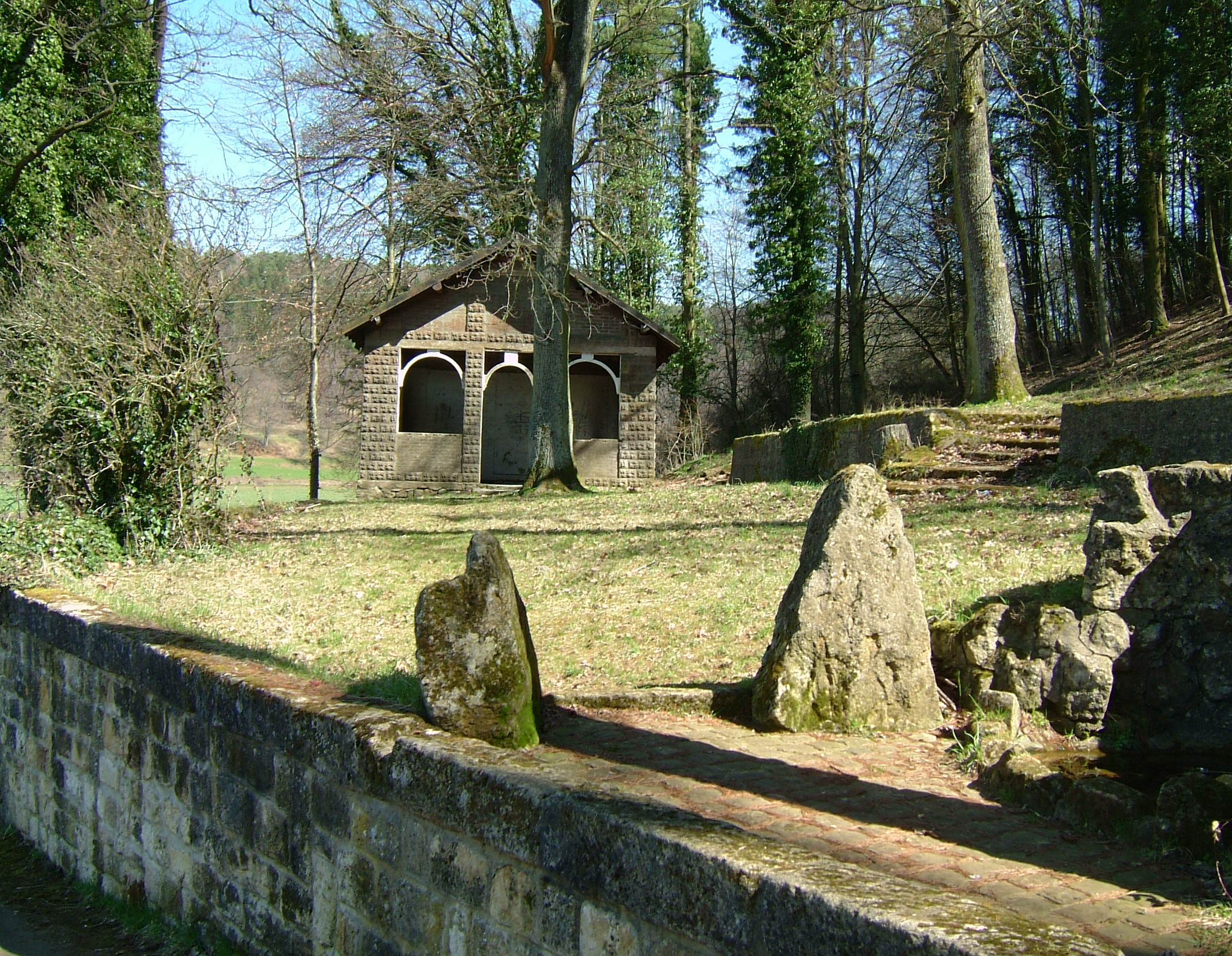 D'Waldschoul zu Téiteng